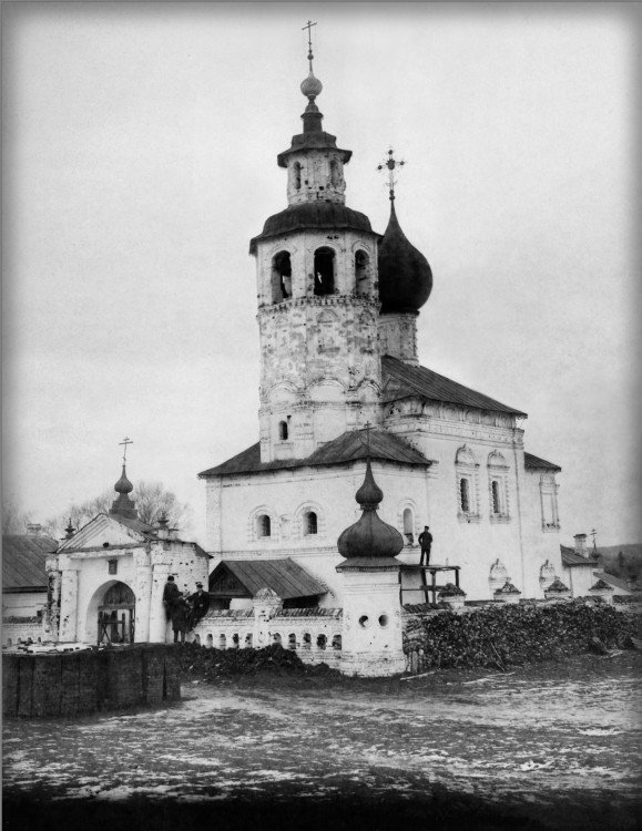 Церковь Преображения: Волокобино, Южский район, Ивановская область